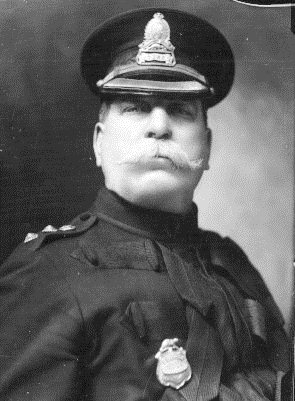 Pierre Bélanger : Chef de police. [192-]. - 1 photographie : négatif sur verre n&b ; 12,5 x 17,5 cm. Photographie de Pierre Bélanger, directeur du Service de la police de 1921 à 1928. Un coin de la plaque de verre est cassé et manquant. Numéro original de la pièce : Z-911. Aussi disponible : 3 négatifs 35 mm. Instrument de recherche : planche-contact Z-911. VM94/Y1,17,902.